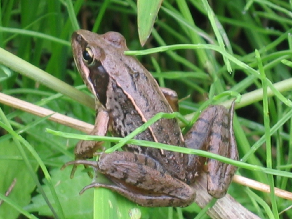 2006年8月15日、利用者自身の撮影、編集。